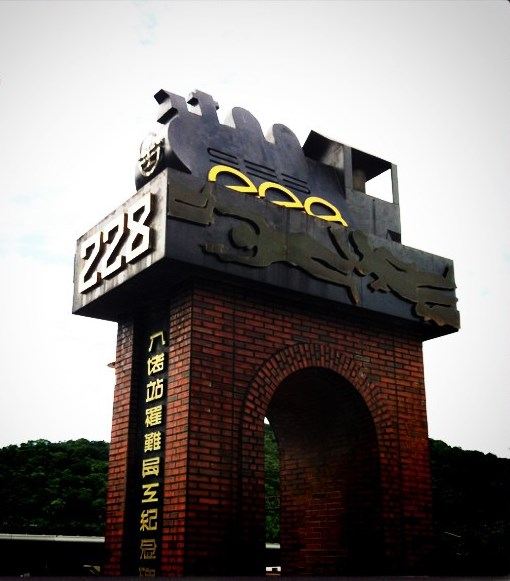 八堵火車站旁有一個二二八紀念碑，該紀念碑是為紀念17名因二二八事件而犧牲生命的八堵站鐵路員工。1993年2月，由罹難站長李丹修、副站長許朝宗(子許義隆曾任基隆市議員, 孫許效舜)的遺族推動建碑，1994年興建完成。